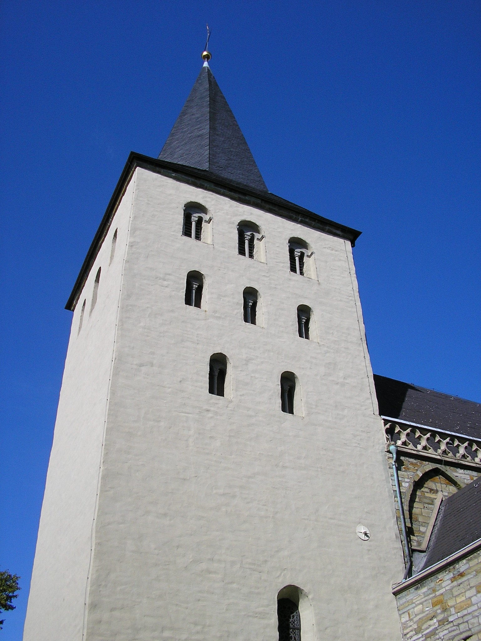 St. Nicolai zu Lippstadt